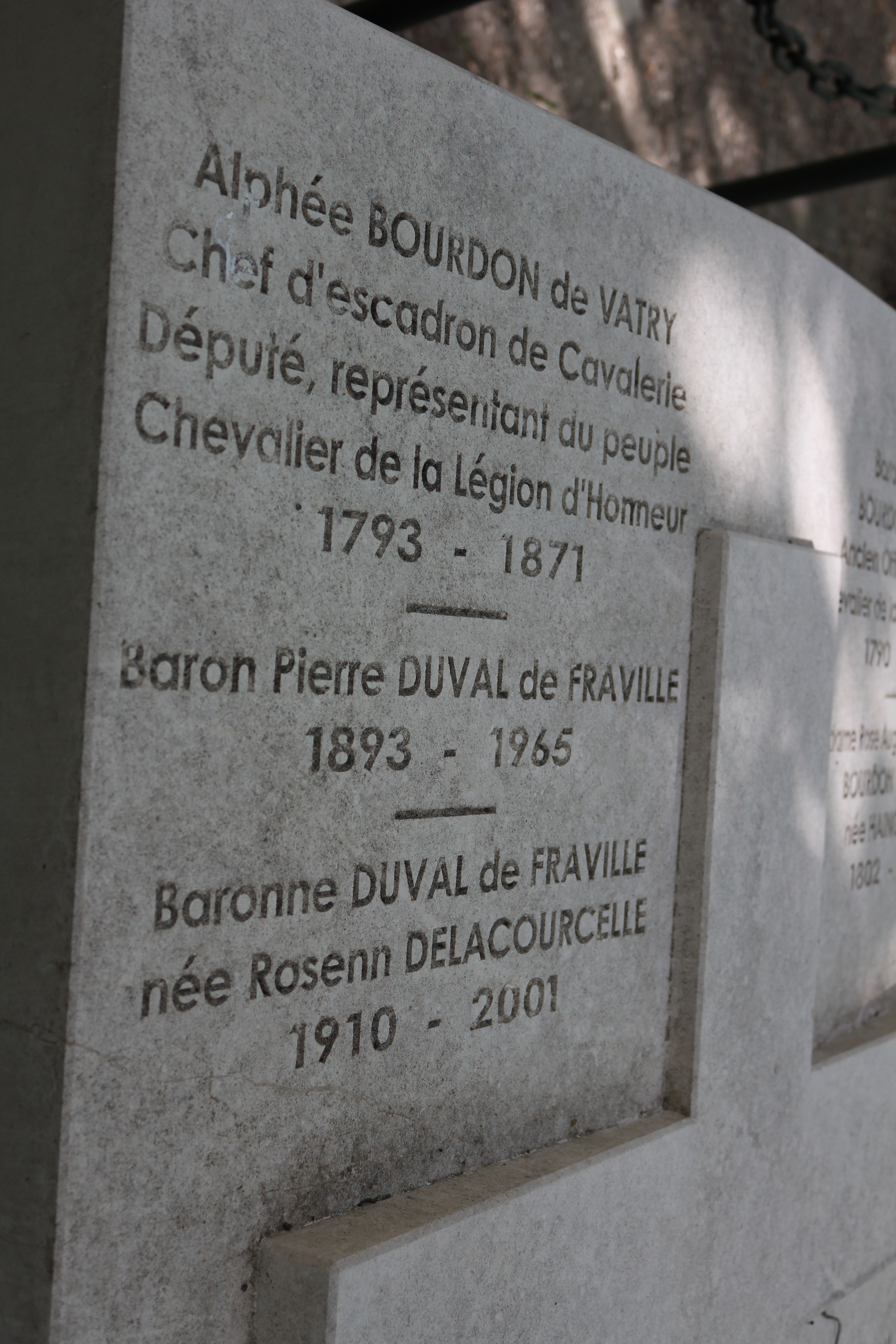 Inscriptions